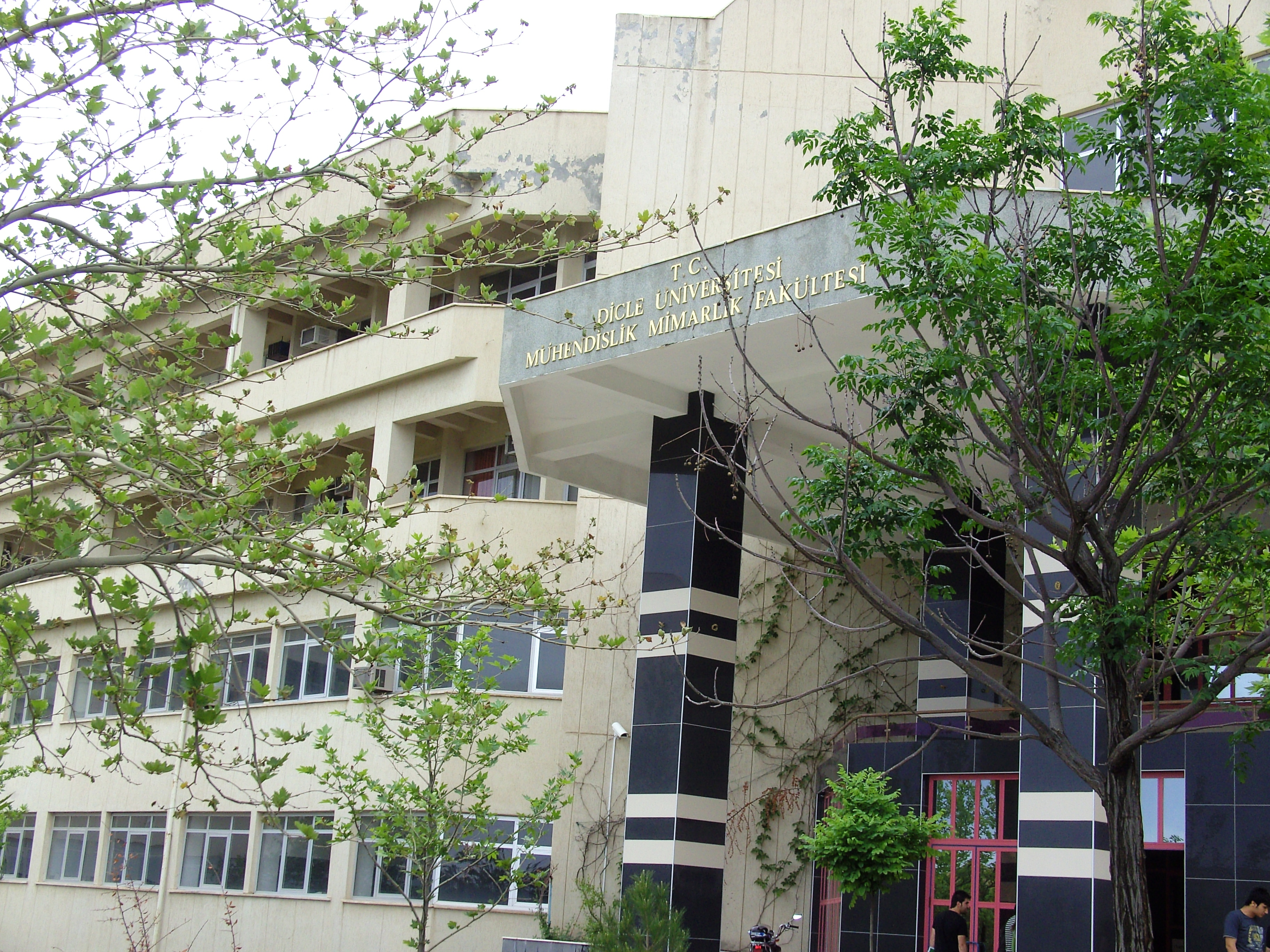 Dicle Üniversitesi Mühendislik Mimarlık Fakültesi.